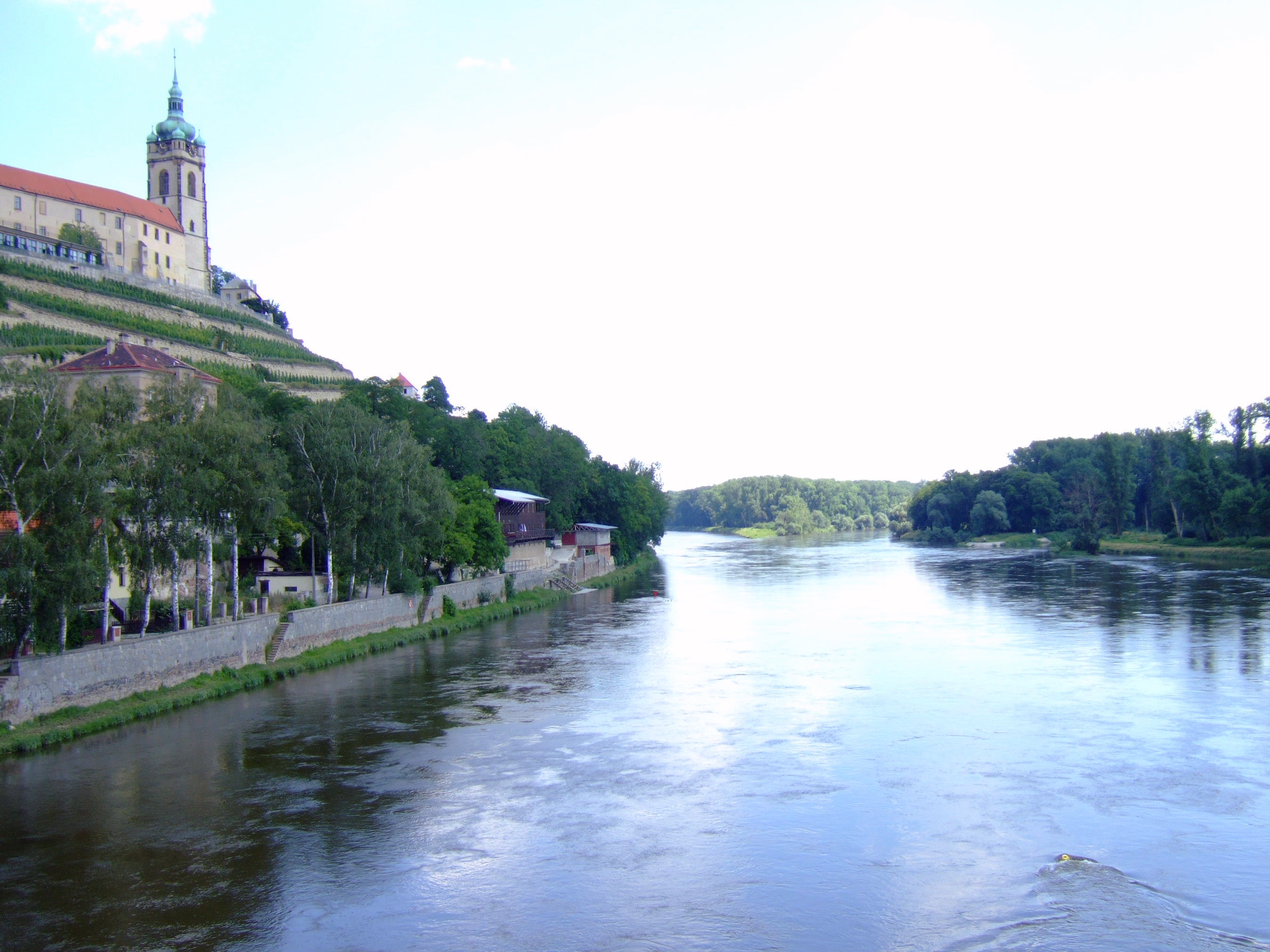 Mündung der Moldau in die Elbe bei Mělník - links oben auf dem Hügel Schloss Lobkowitz Aufnahme: 3. Juli 2006 Url